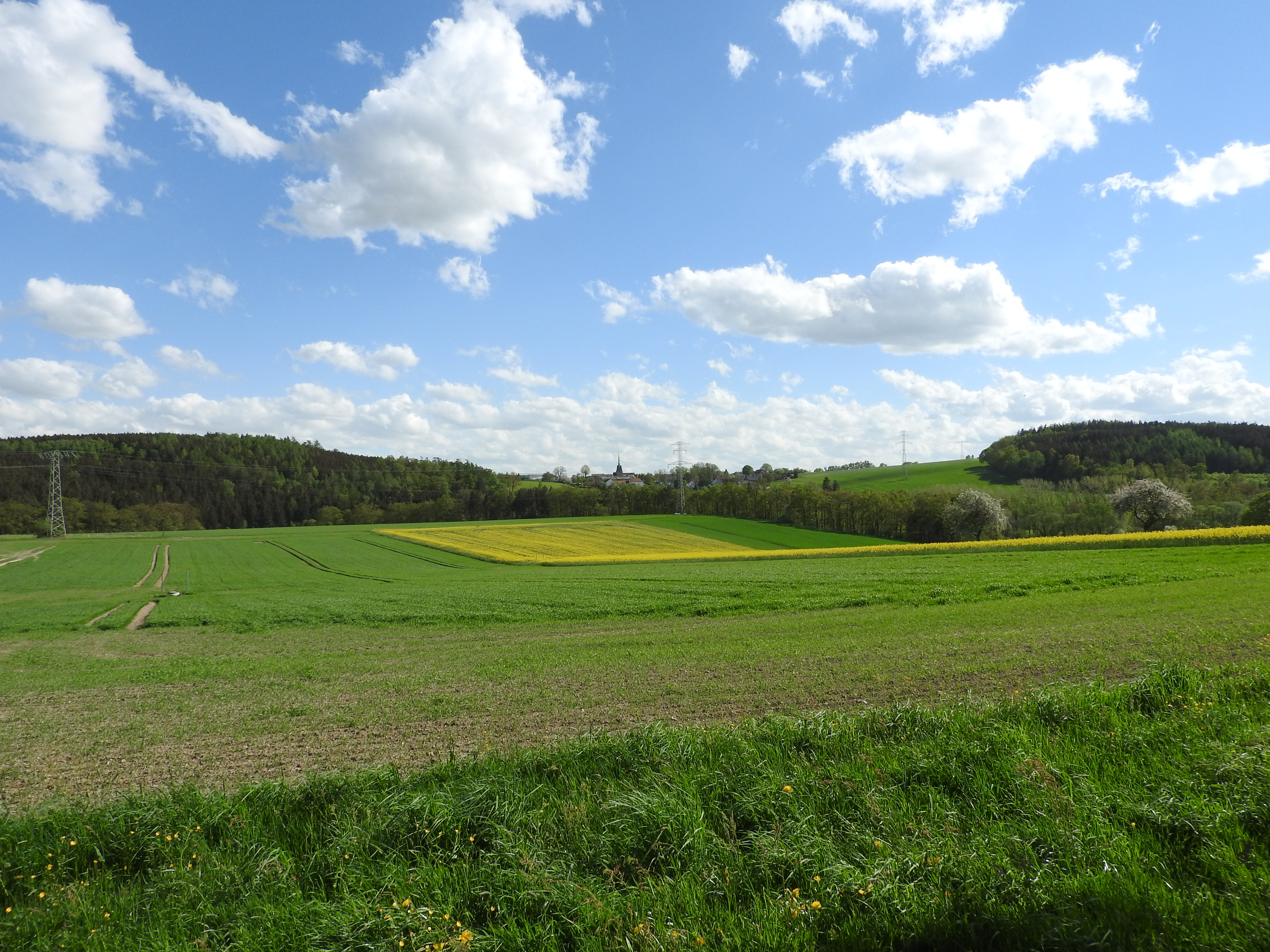 Blick von Wiebelsdorf auf Wöhlsdorf, Auma-Weidatal, Thüringen